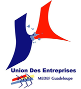 Logo UDE-MEDEF Guadeloupe